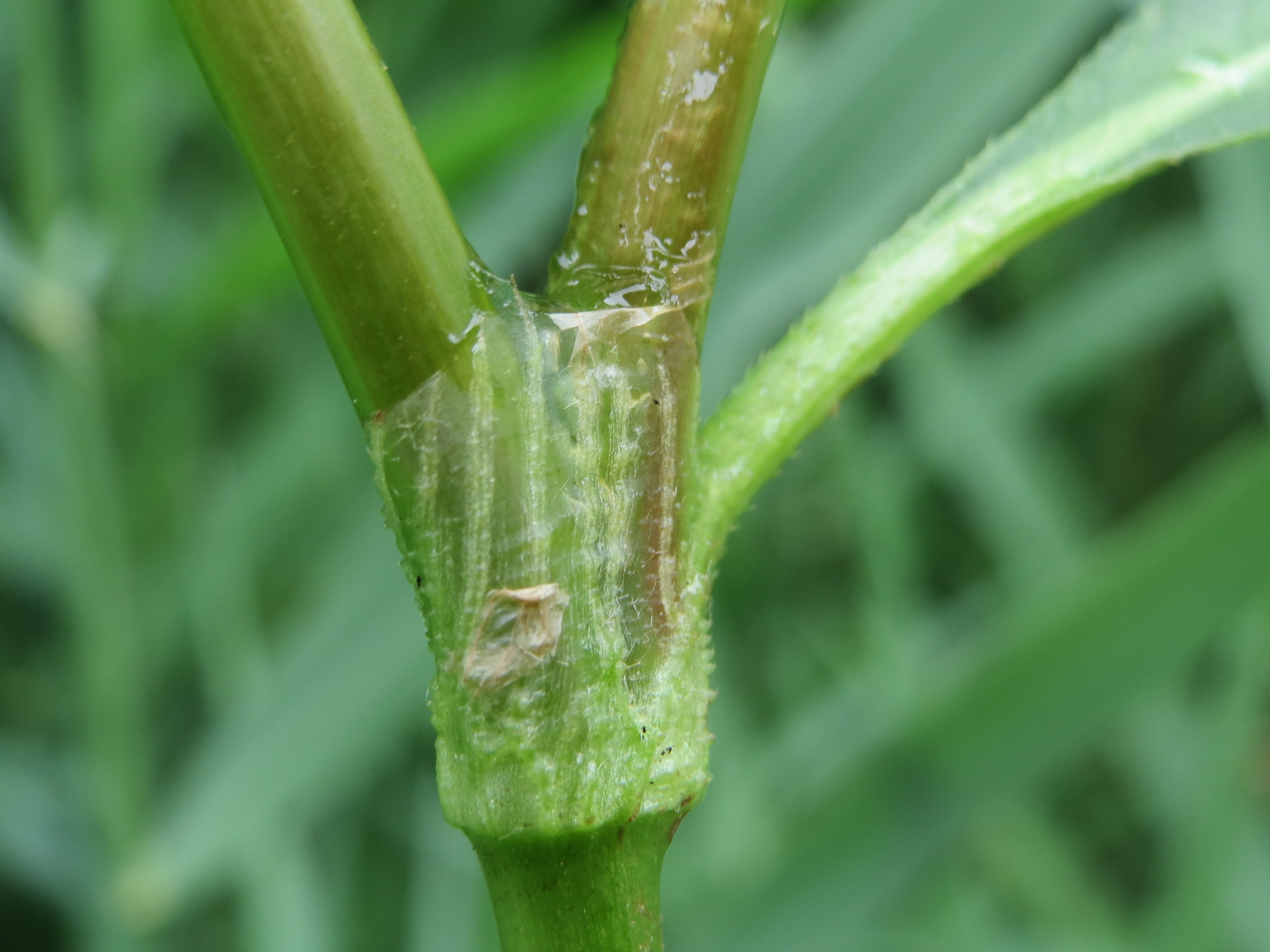 Ampfer-Knöterich (Persicaria lapathifolia) bei Reilingen